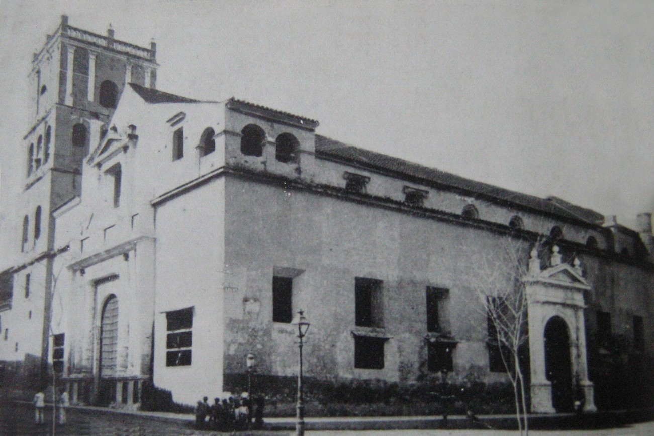 Vista de la Catedral de Cartagena de Indias, al rededor de 1900, se puede ver la torre original, antes de ser cambiada por la actual en 1922.